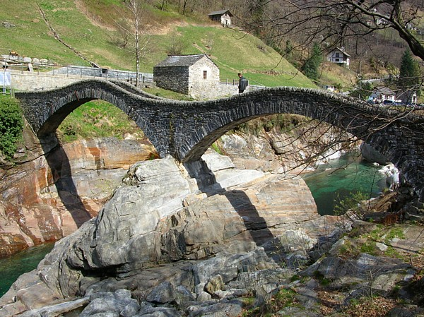 Lavertezzo in Valle Verzasca: Ponte dei Salti picture taken by user:Idéfix, april 2005